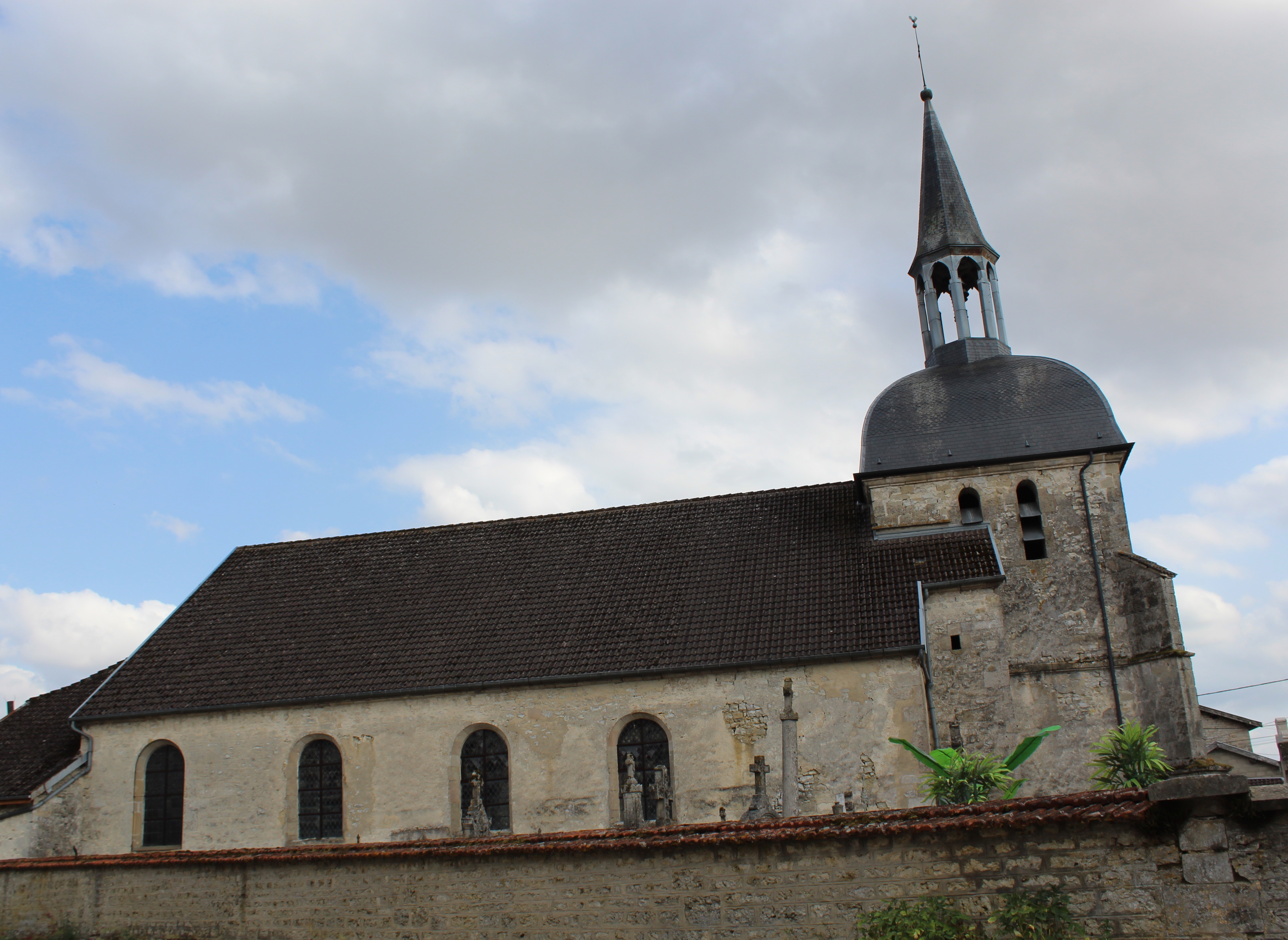 L'église.